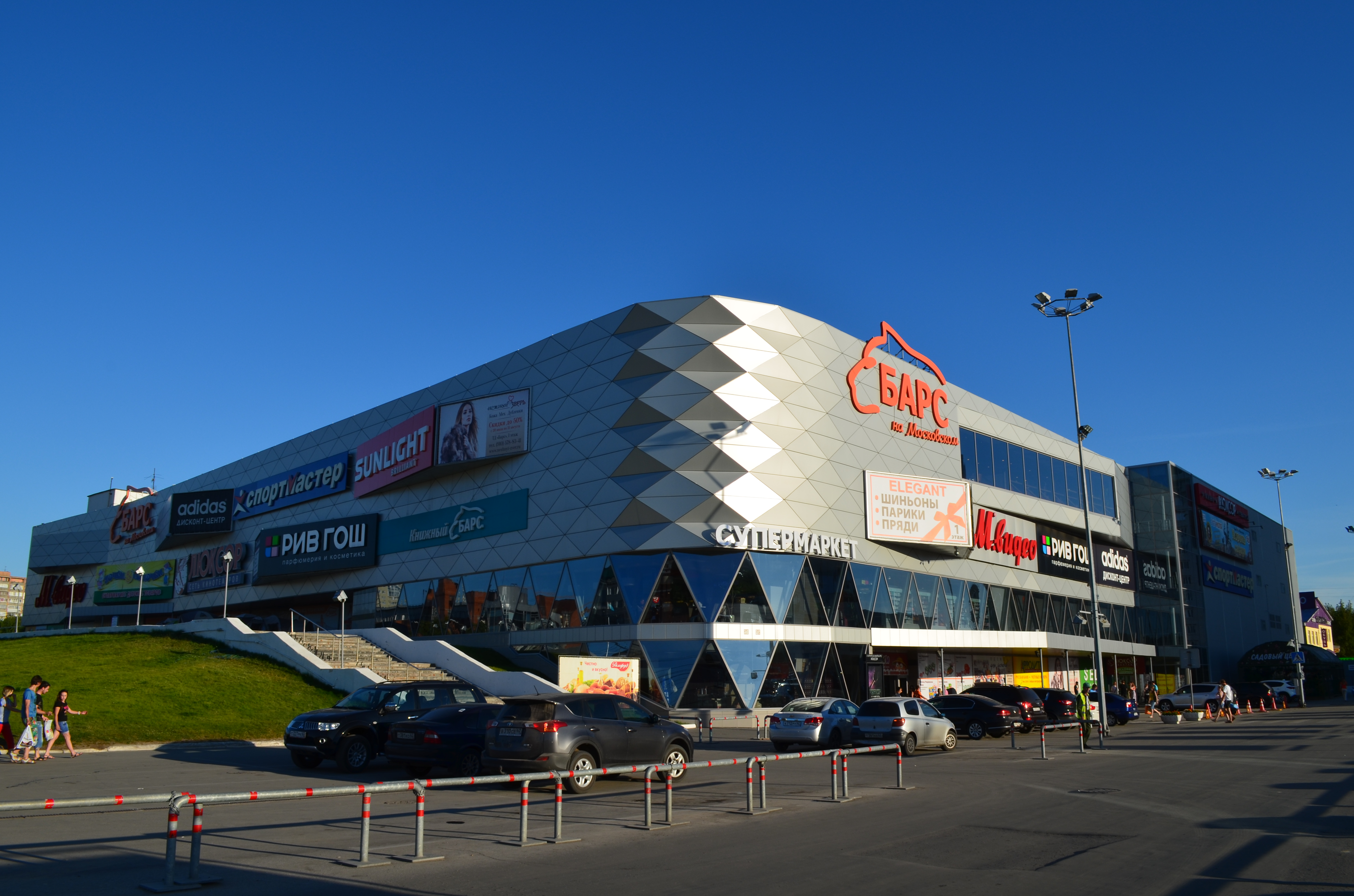 ТЦ"Барс на Московском".с 1985 года.